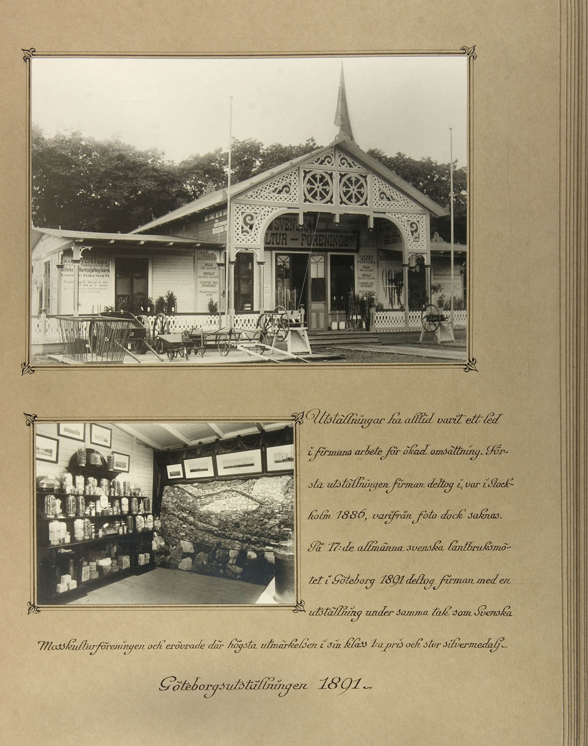 depicted place: Västergötland, Västra Götaland, Göteborg, Göteborg (Sverige (SE))